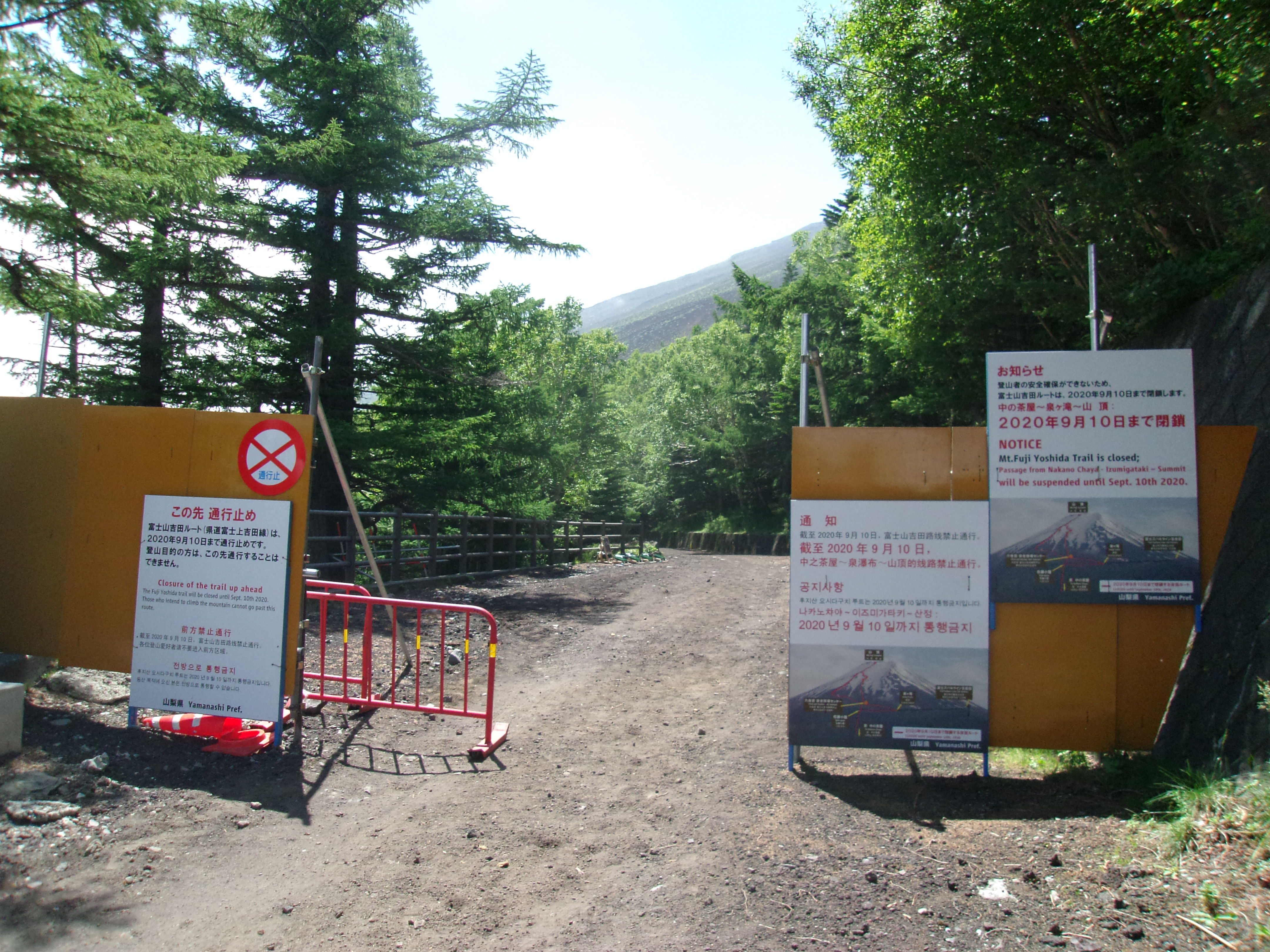 新型コロナウイルス感染防止措置で2020年の夏は富士登山が禁止となり、登山道が閉鎖された吉田口5合目。